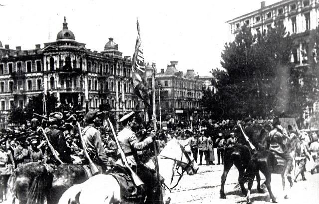 Вступление Красной армии в Киев, лето 1920 года